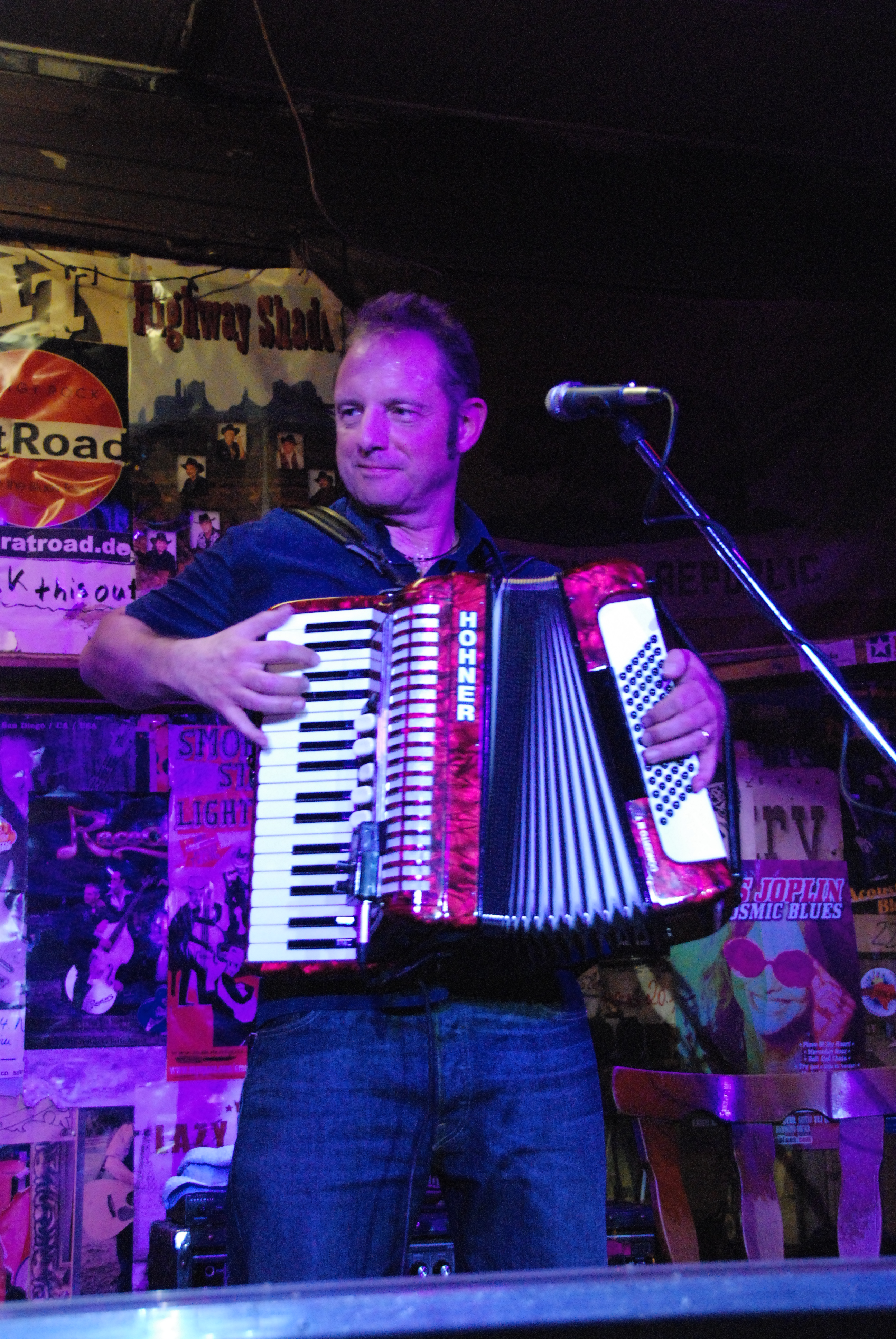 Ludwig Seuss im Rattlesnake Saloon in München